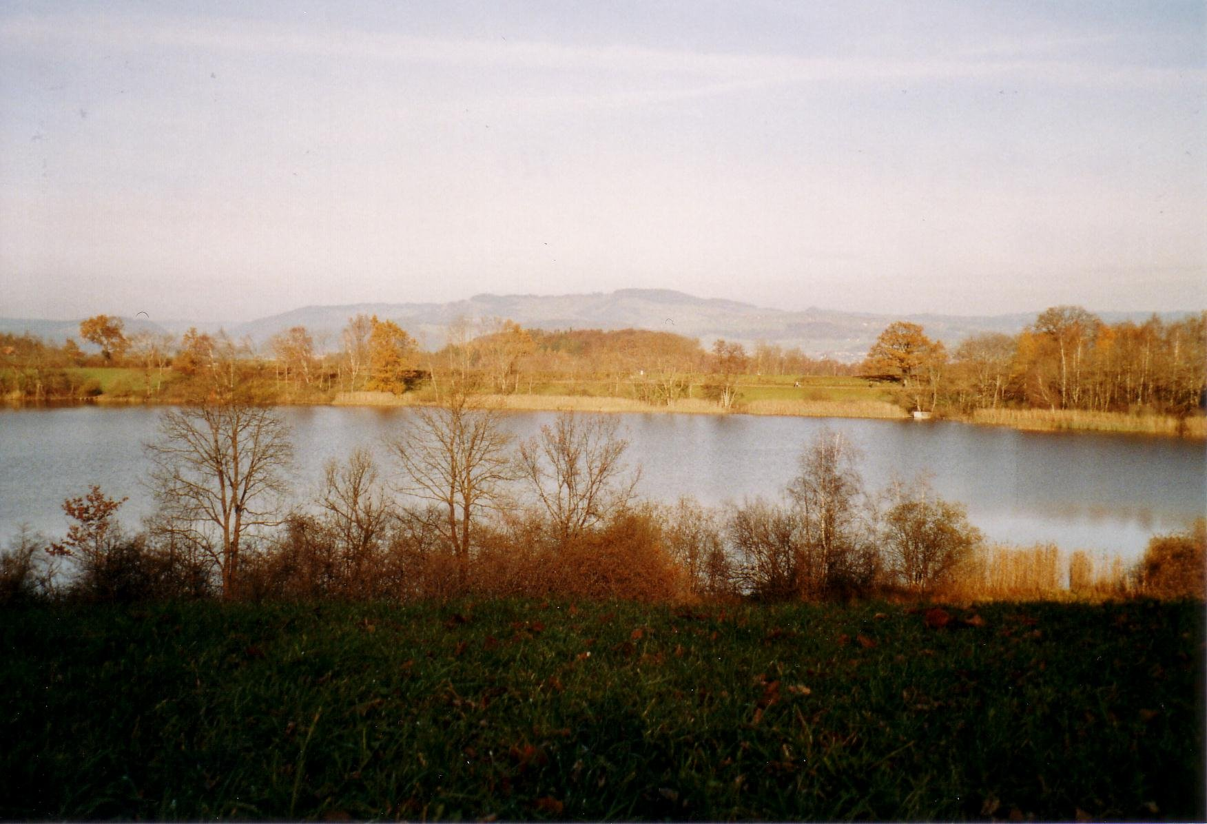 Uebeschisee mit Blick nach Osten